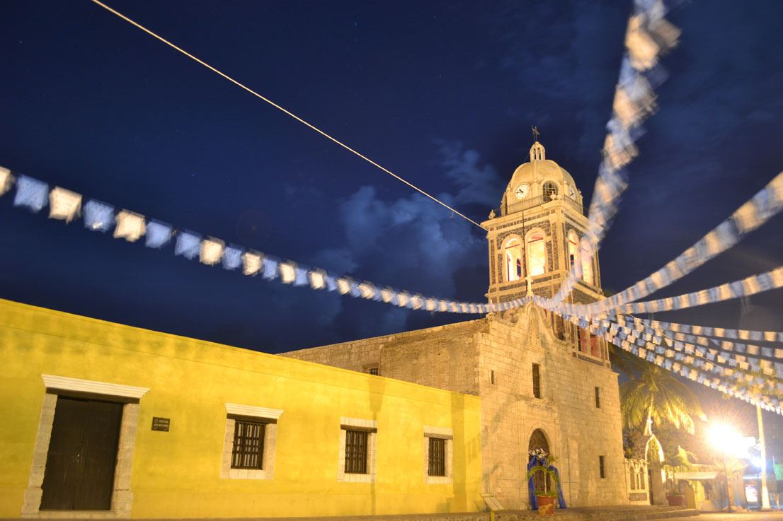 Misión de Nuesta Señora de Loreto,, una noche antes de que iniciara la novena en honor a Nuestra Señora de Loreto. Loreto, Baja California Sur. Pueblo Mágico. Primera Capital de las Californias